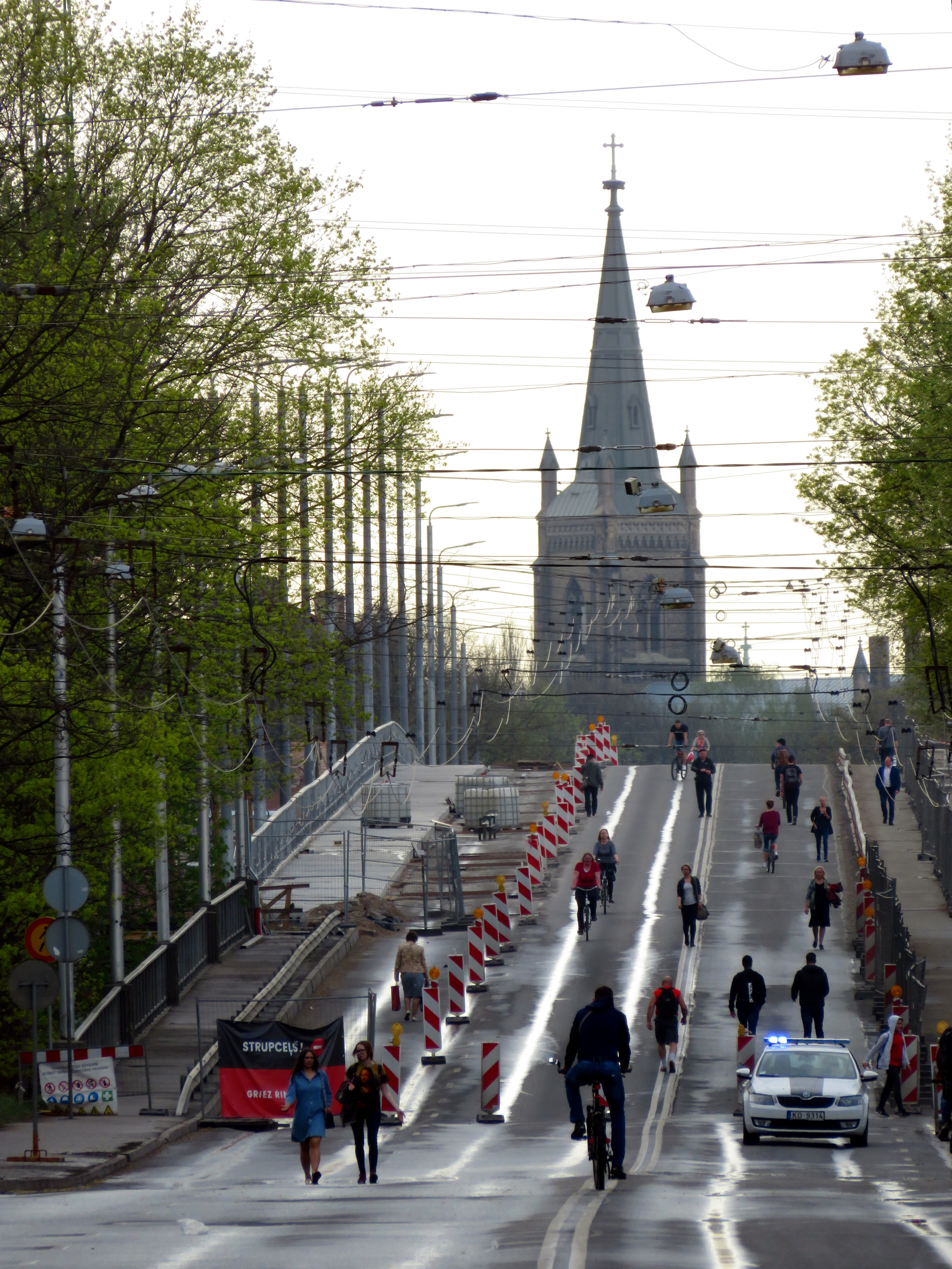 Augusta Deglava tilts pēc slēgšanas